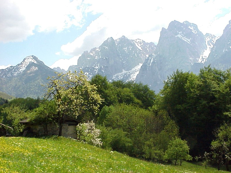 Blick aus dem Kaisertal zum Wilden Kaiser mit Totenkirchl, Karlspitzen und Ellmauer Halt